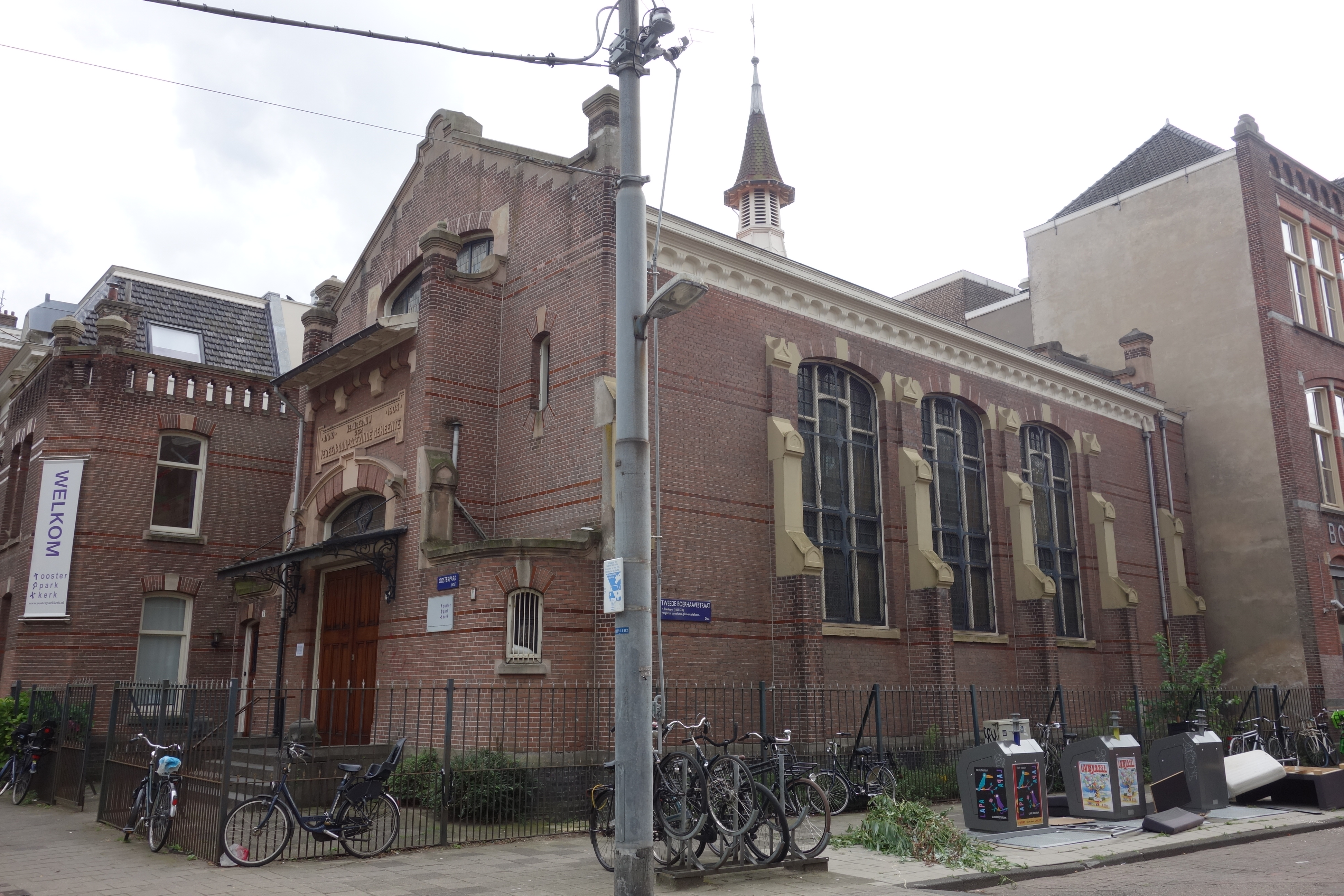 Overzicht van de Oosterparkkerk in Amsterdam-Oost.